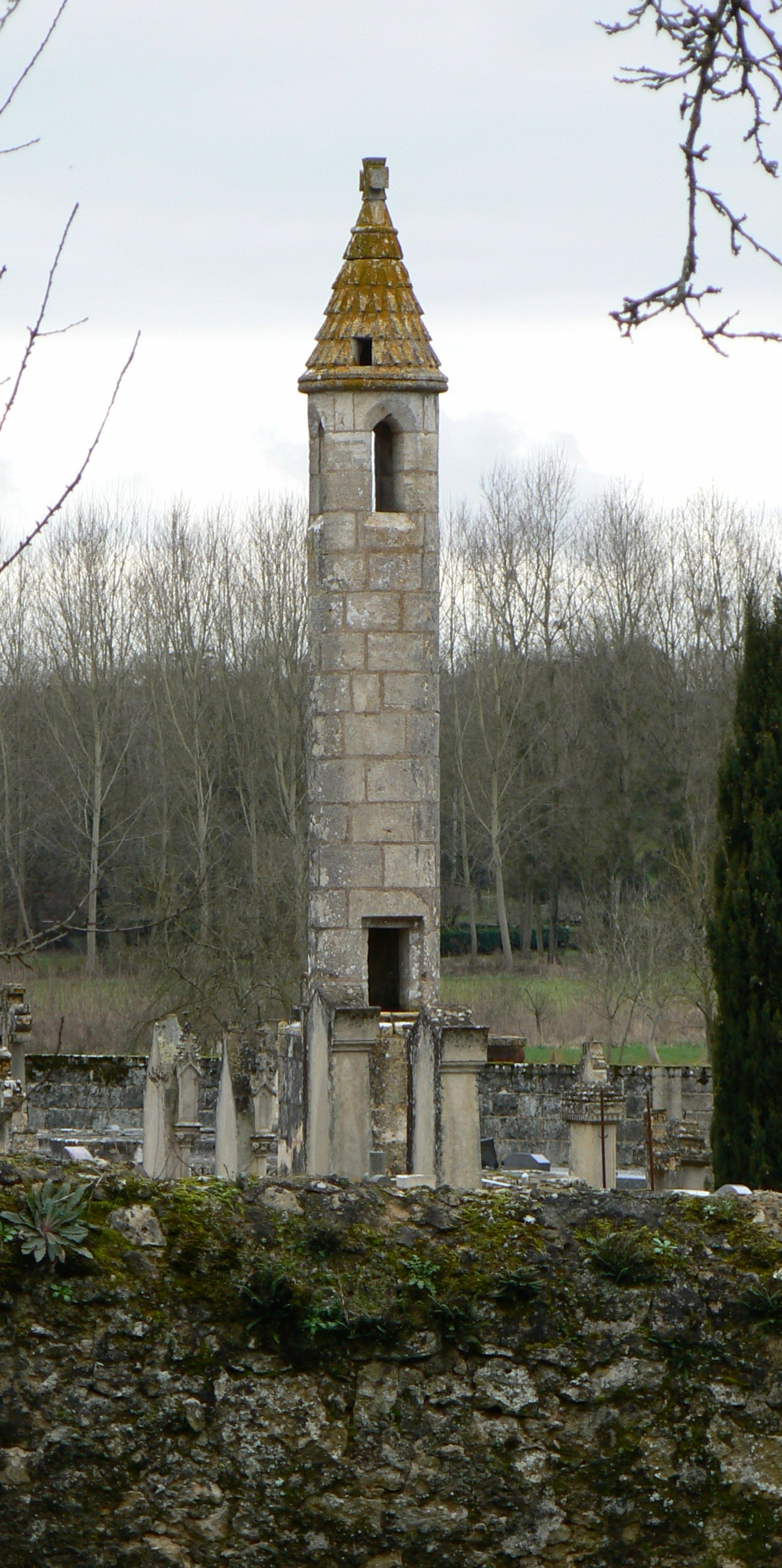 Lanterne des morts, XIII siècle.